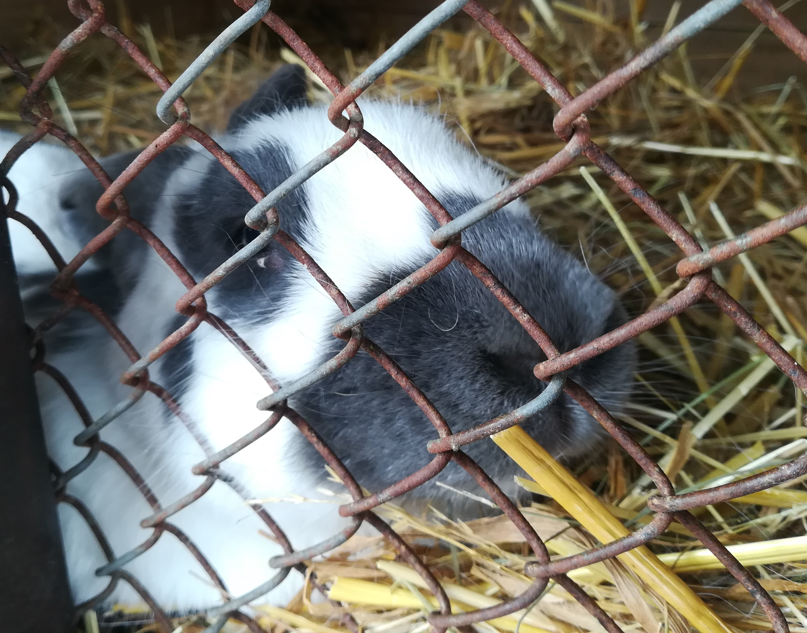 Królik popielański biały. Muzeum Rolnictwa w Szreniawie.